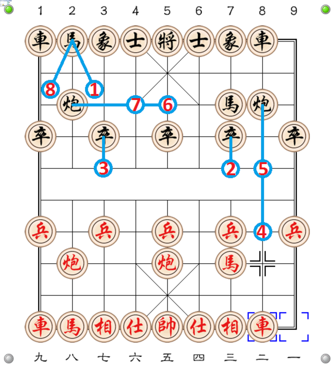 Trung pháo đối M8.7